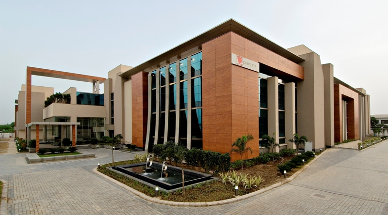 Patni Noida Green Building